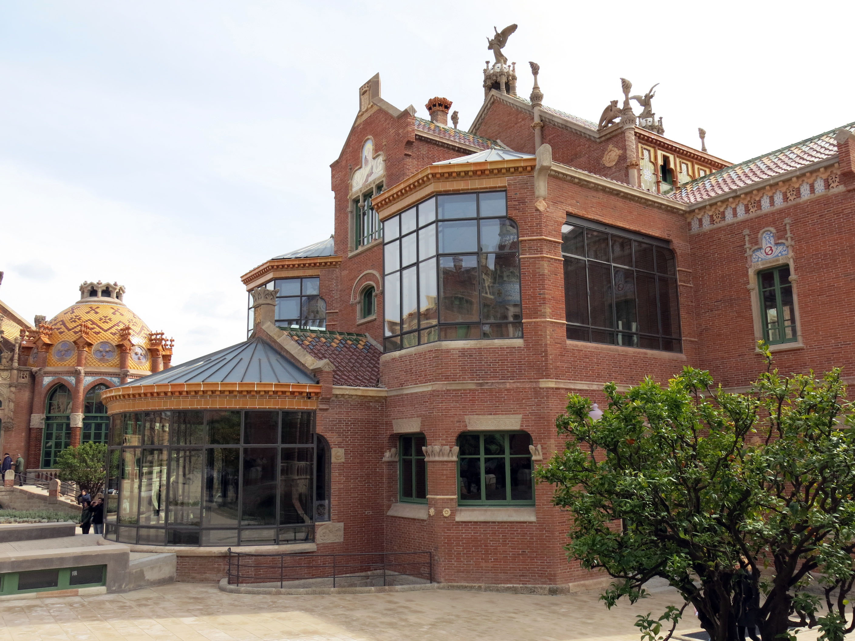 Hospital de la Santa Creu i Sant Pau (Barcelona)